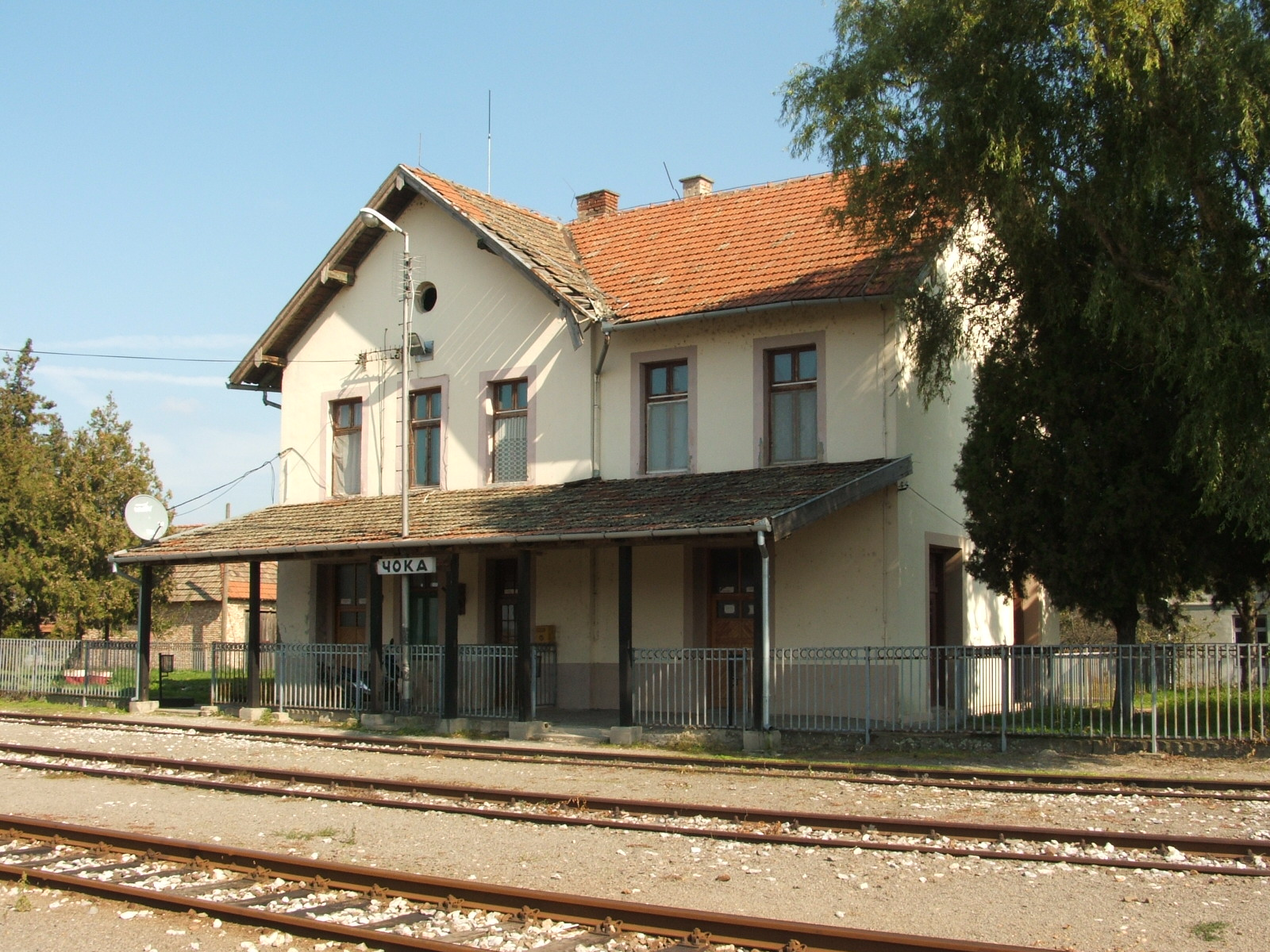 Csóka vasútállomása